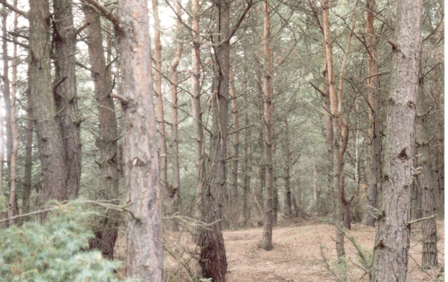 Las sosnowy przy wsi Julianów Raducki